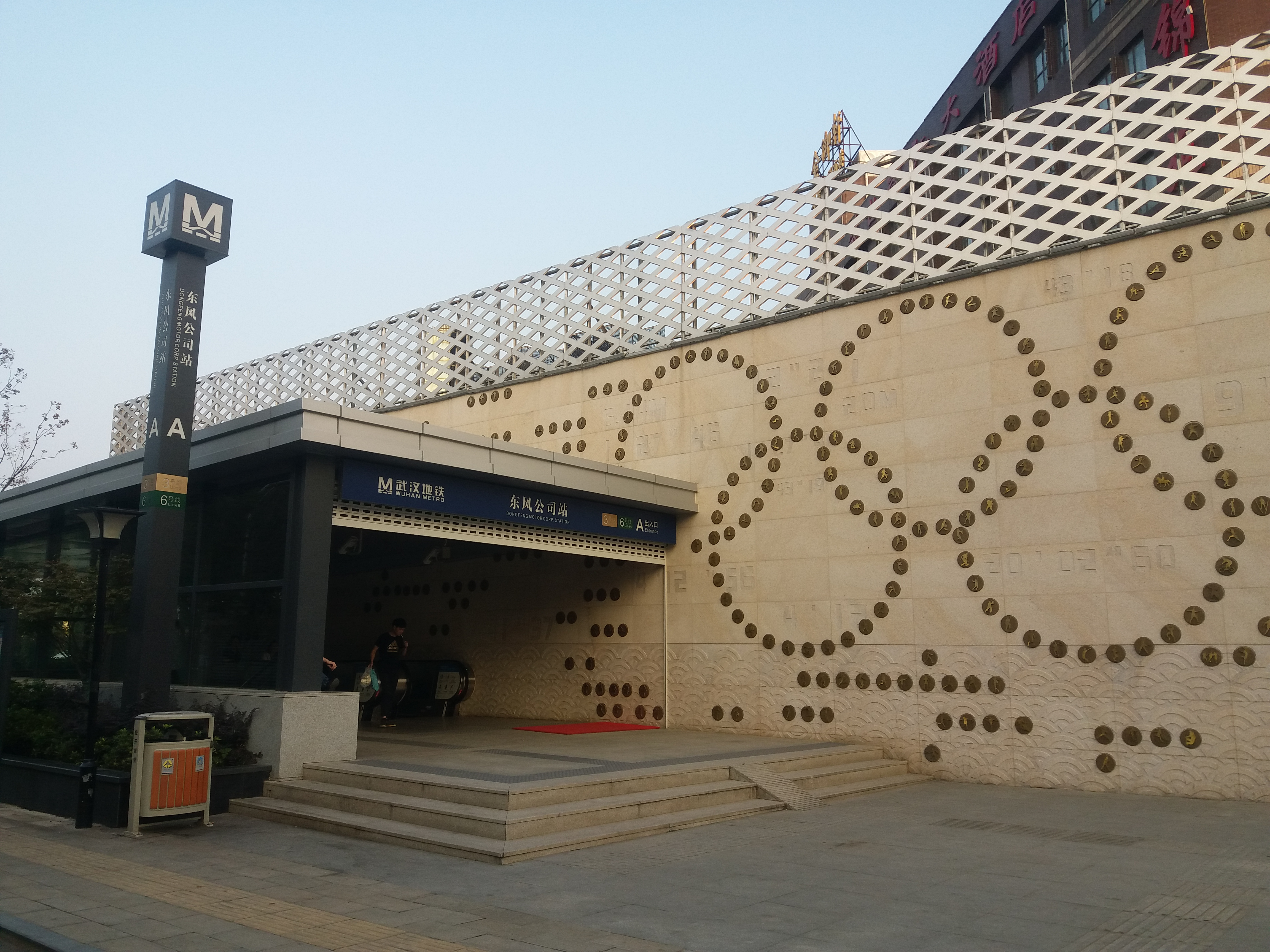 东风公司站A出口及风亭